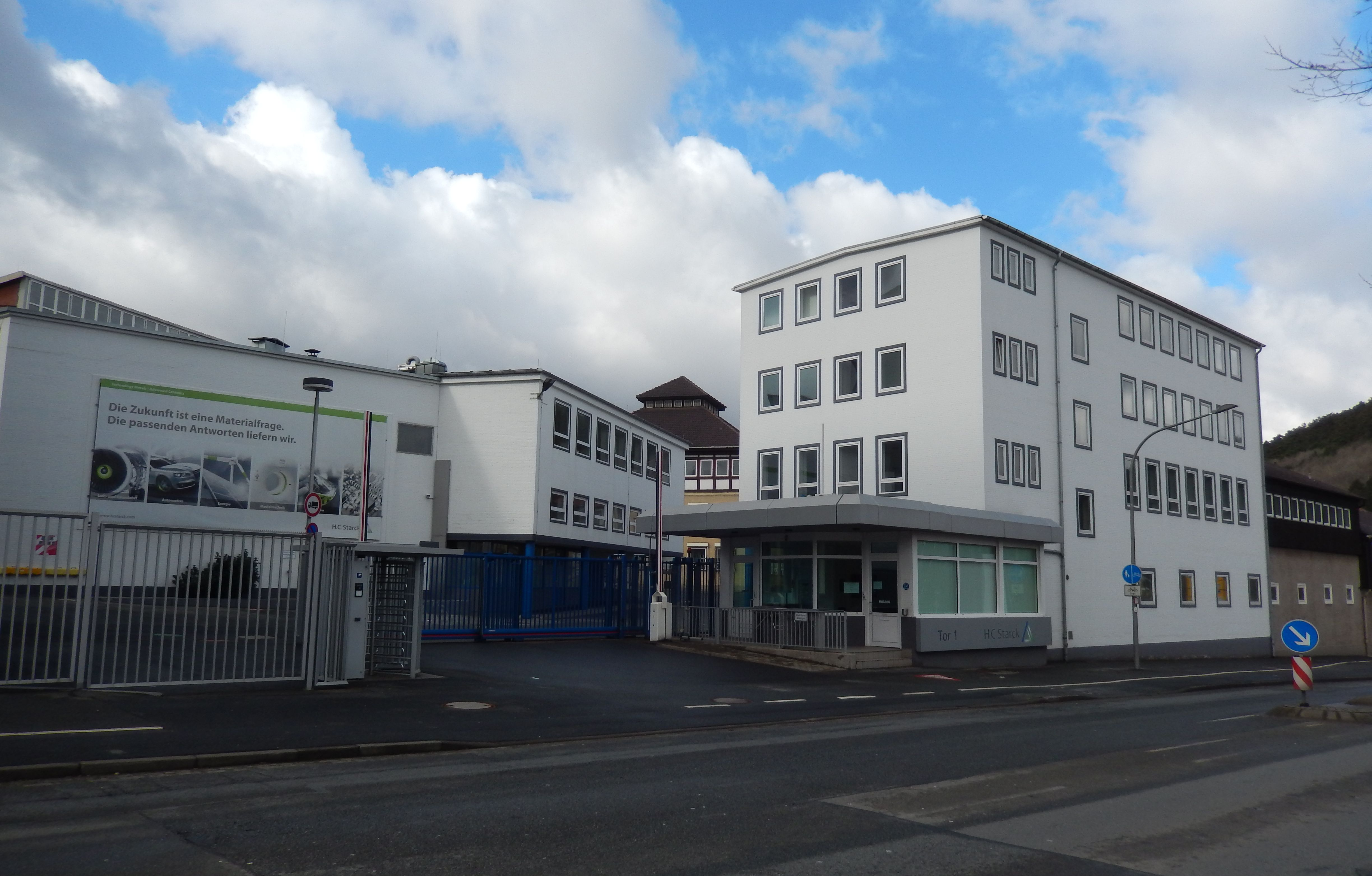 Firma H.C. Starck, Werk Goslar, Einfahrt